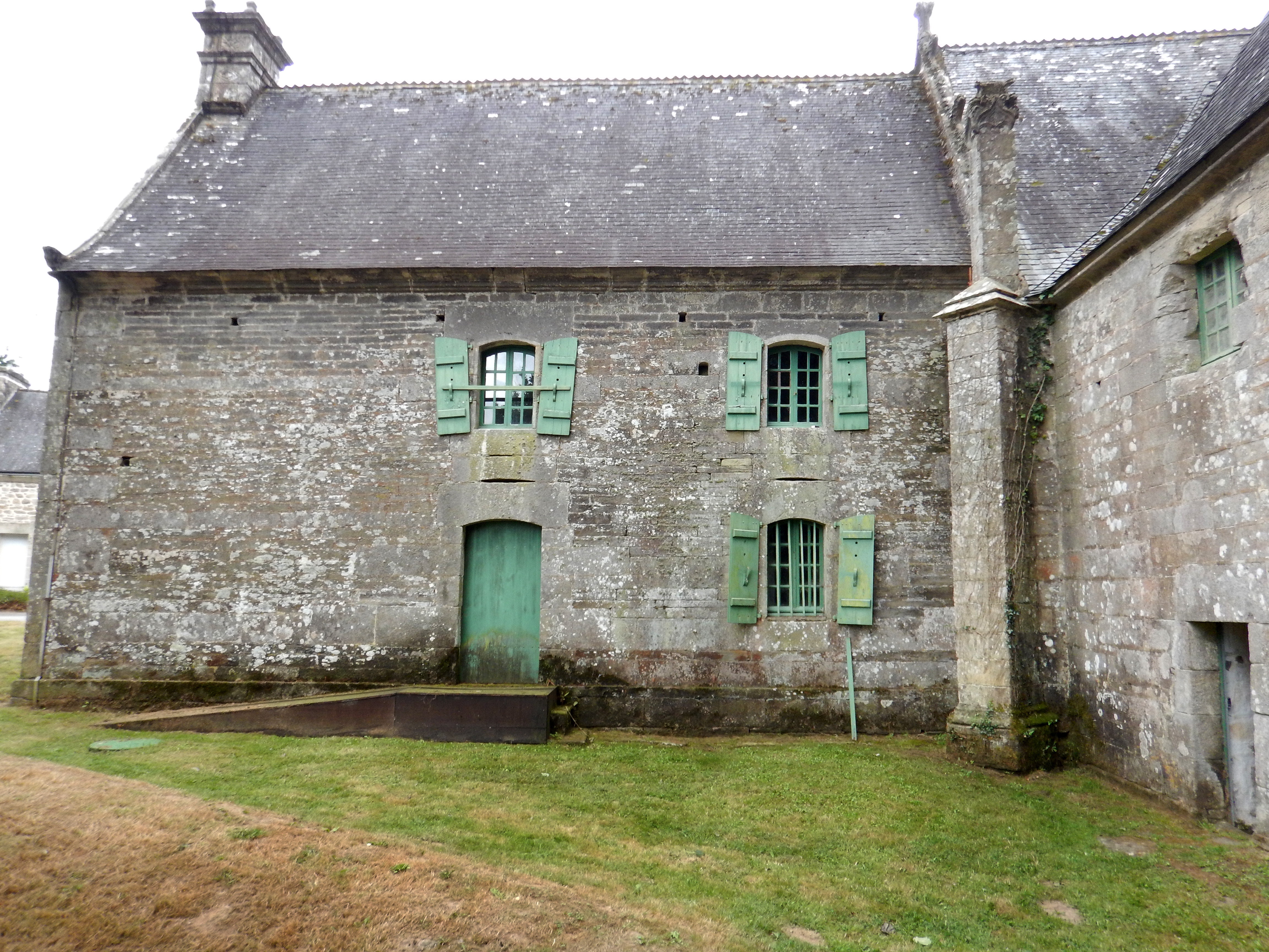 La maison du chapelain et (à droite) la sacristie accolées à la Chapelle Saint-Nicodème (XVIème siècle) à Pluméliau (Bretagne) 2016